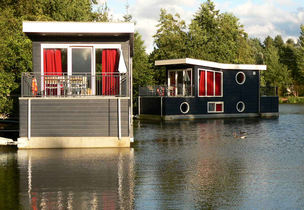 Hausboothäuser im Center Park Bispingen